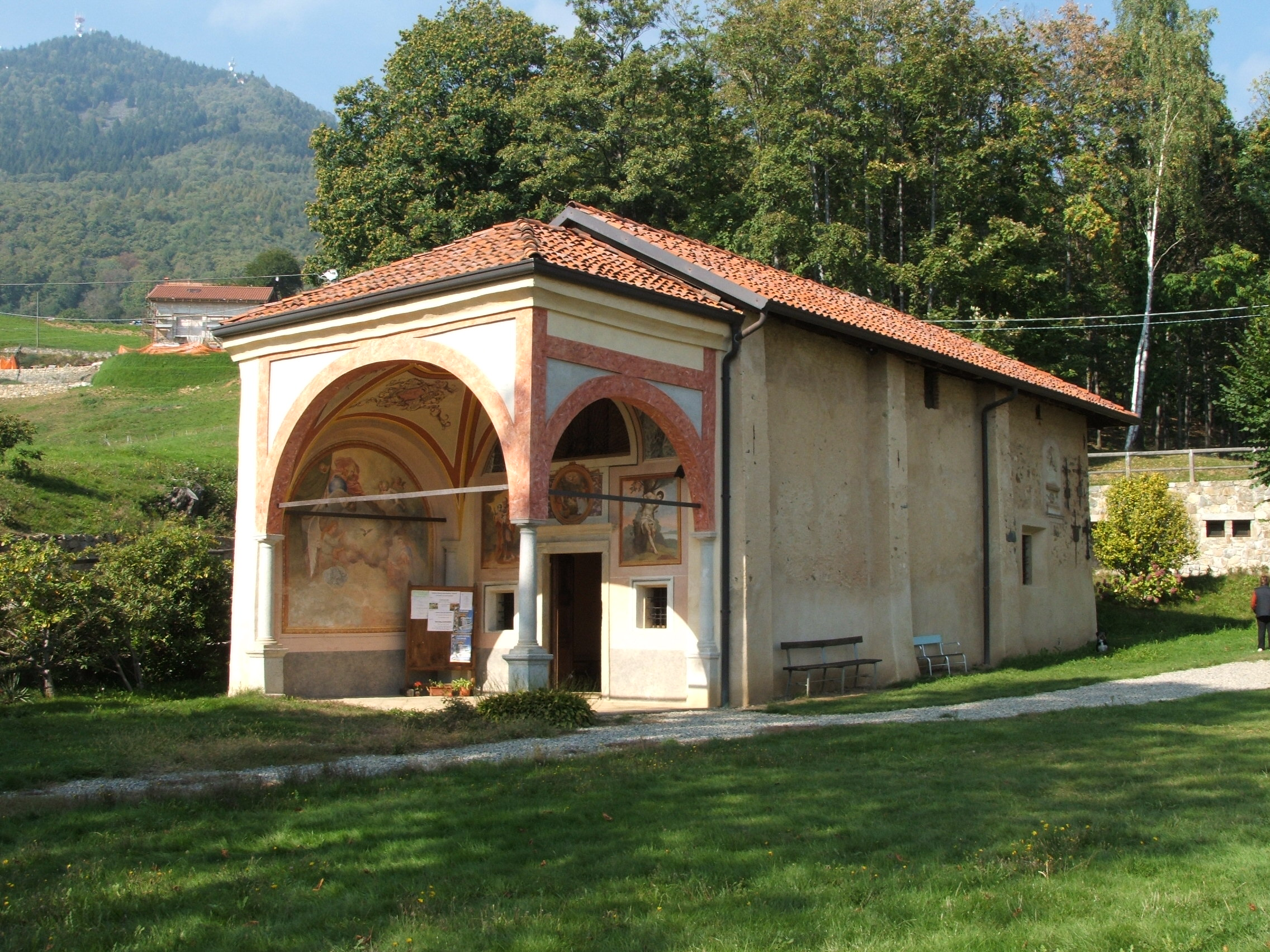 Immagine dal Santuario di Nostra Signora della Brughiera, presso Trivero (provincia di Biella, Piemonte, Italia)